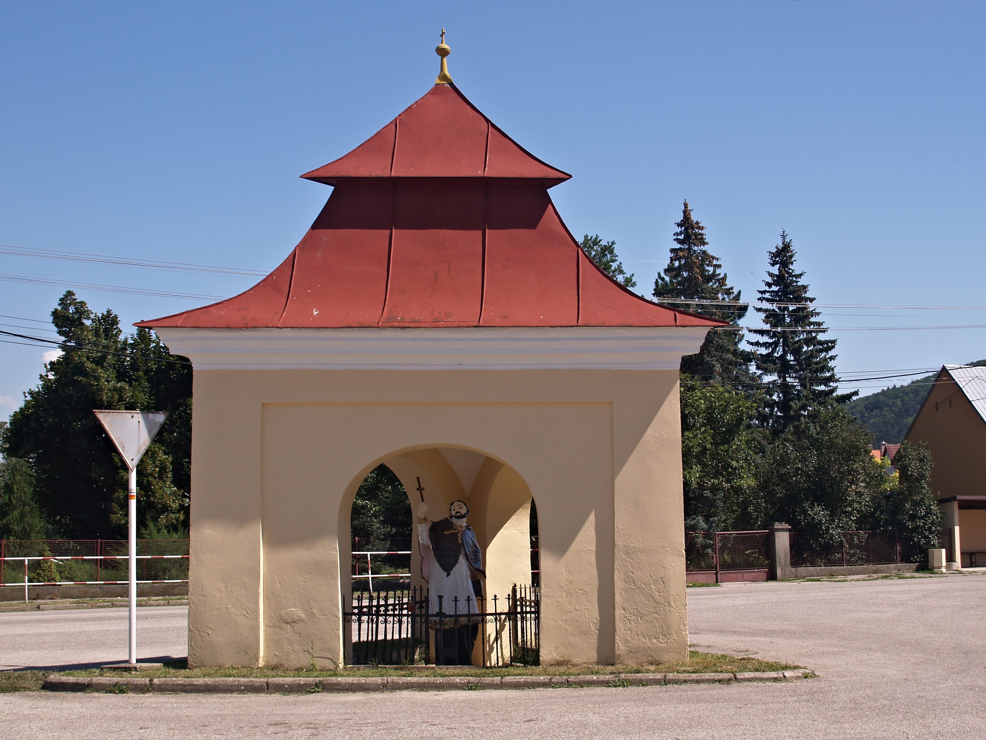 Beckov (Slovakia) - Chapelle_Saint-Jean Népomucène